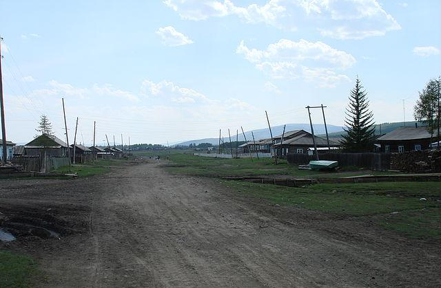 фотография окрестностей поселка Уакит